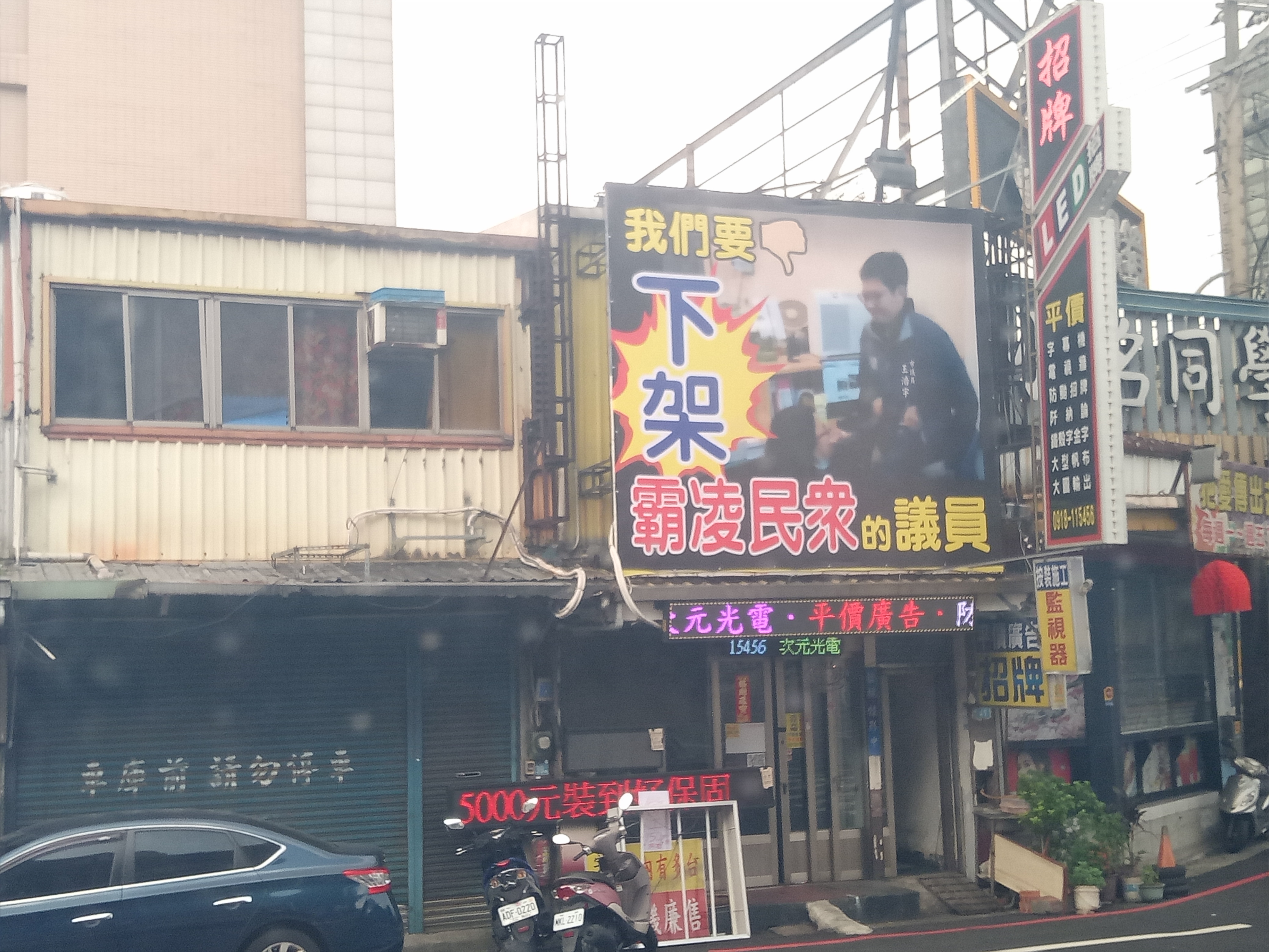 中文（台灣）: 中壢市區街景。